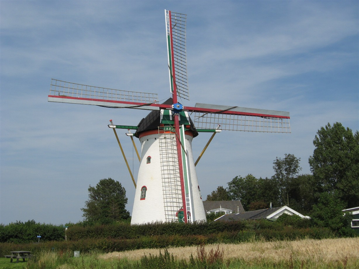 Aeolus, mill in Dreischor